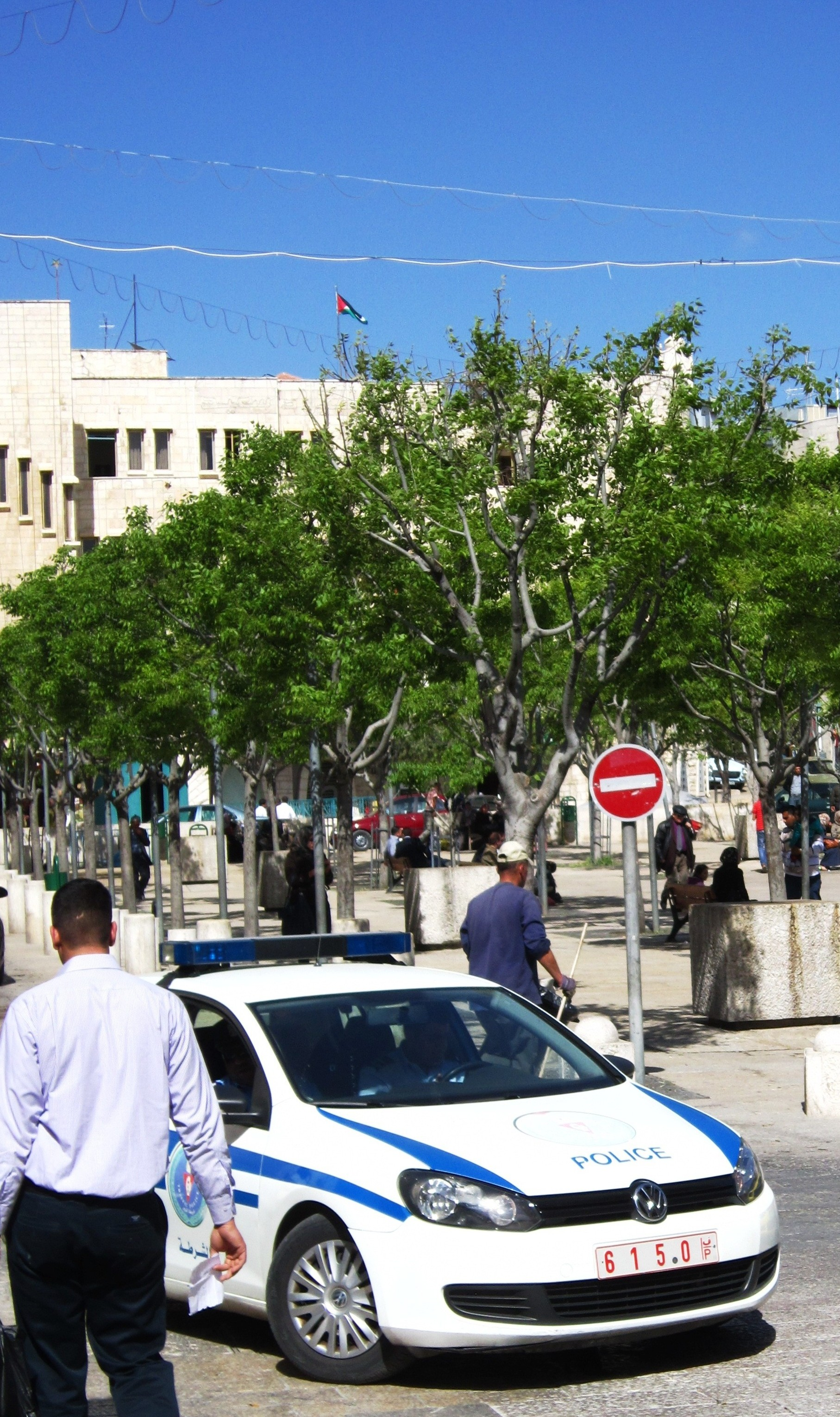 Palestinian territories police licenseplate